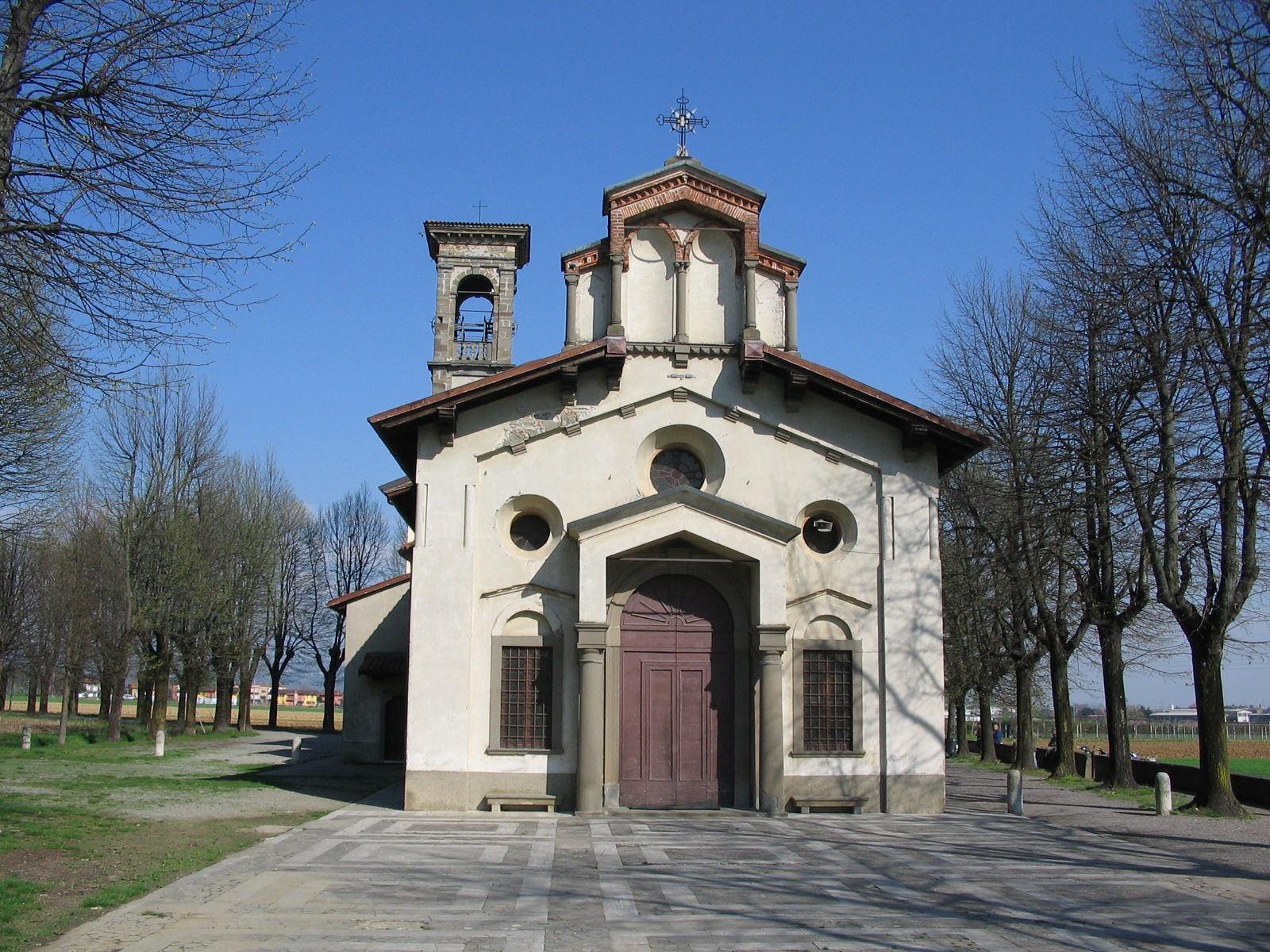 Mapello, Santuario Madonna di Prada.